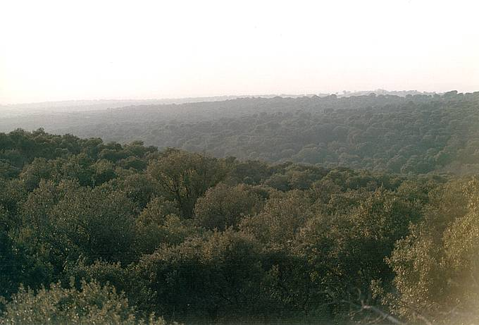 Monte del Pardo. Madrid, España.